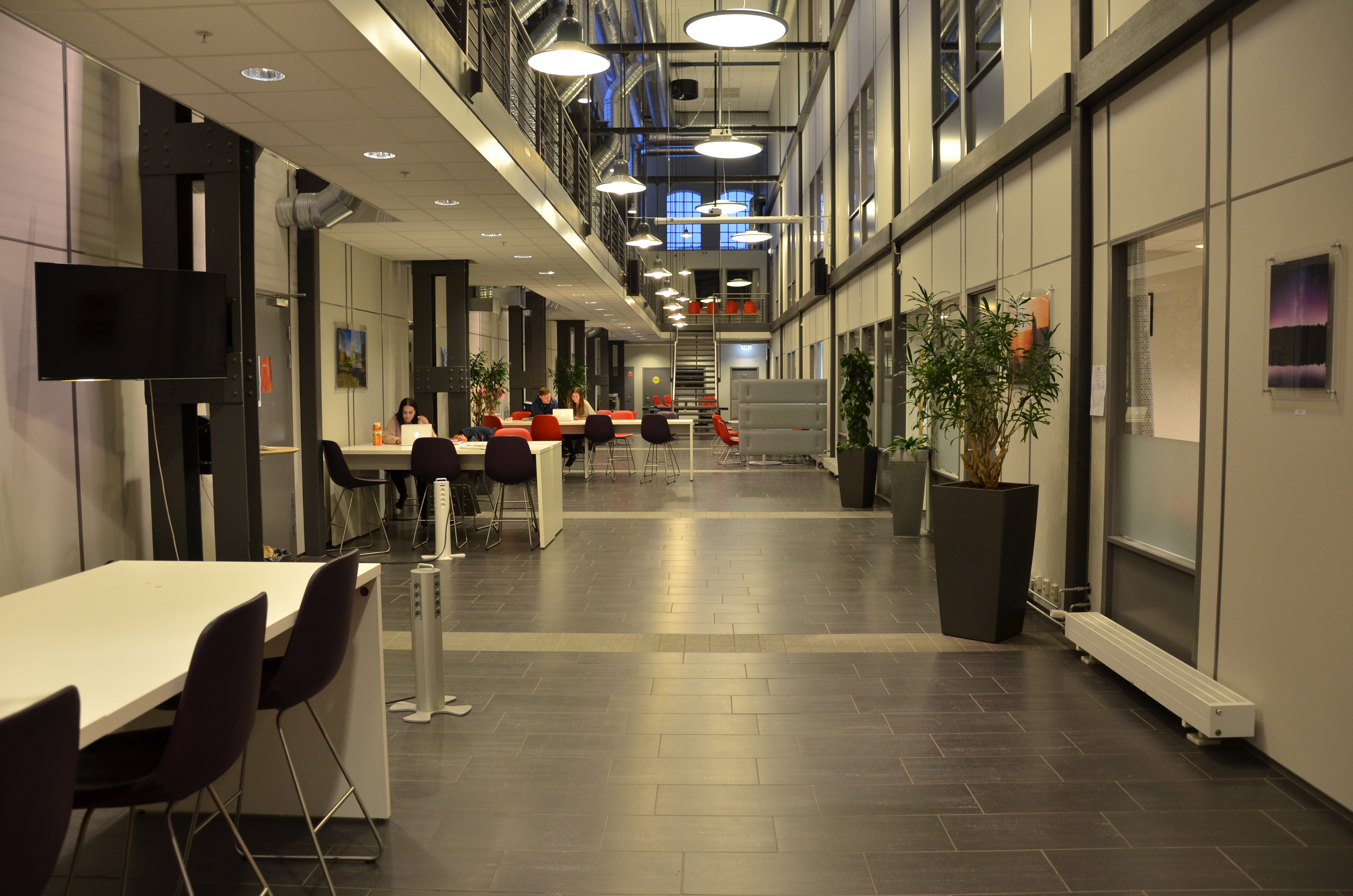 Skolens "vrimleområde" i 2016 ,sett fra inngangen i 1. etasje.